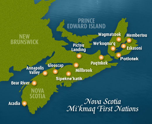 Carte de la Nouvelle-Ecosse présentant la localisation des réserves Micmacs sur l'île.